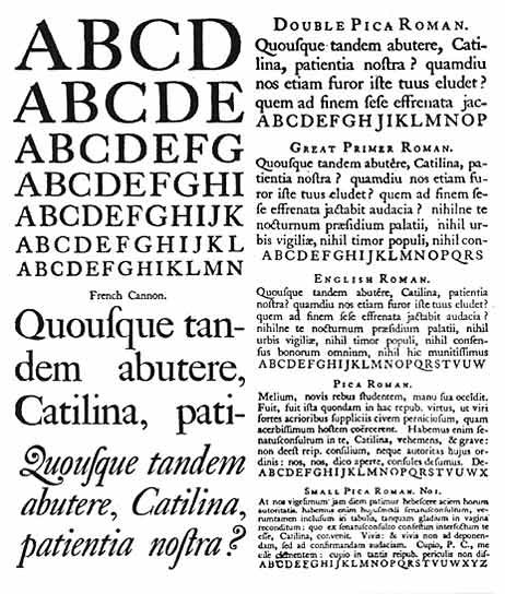 Fuente Caslon 1734